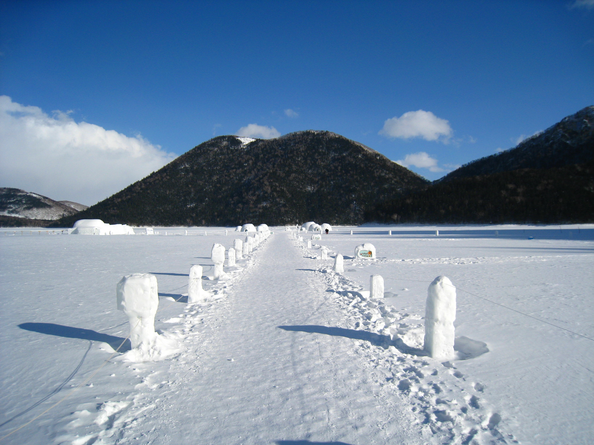 氷上コタン